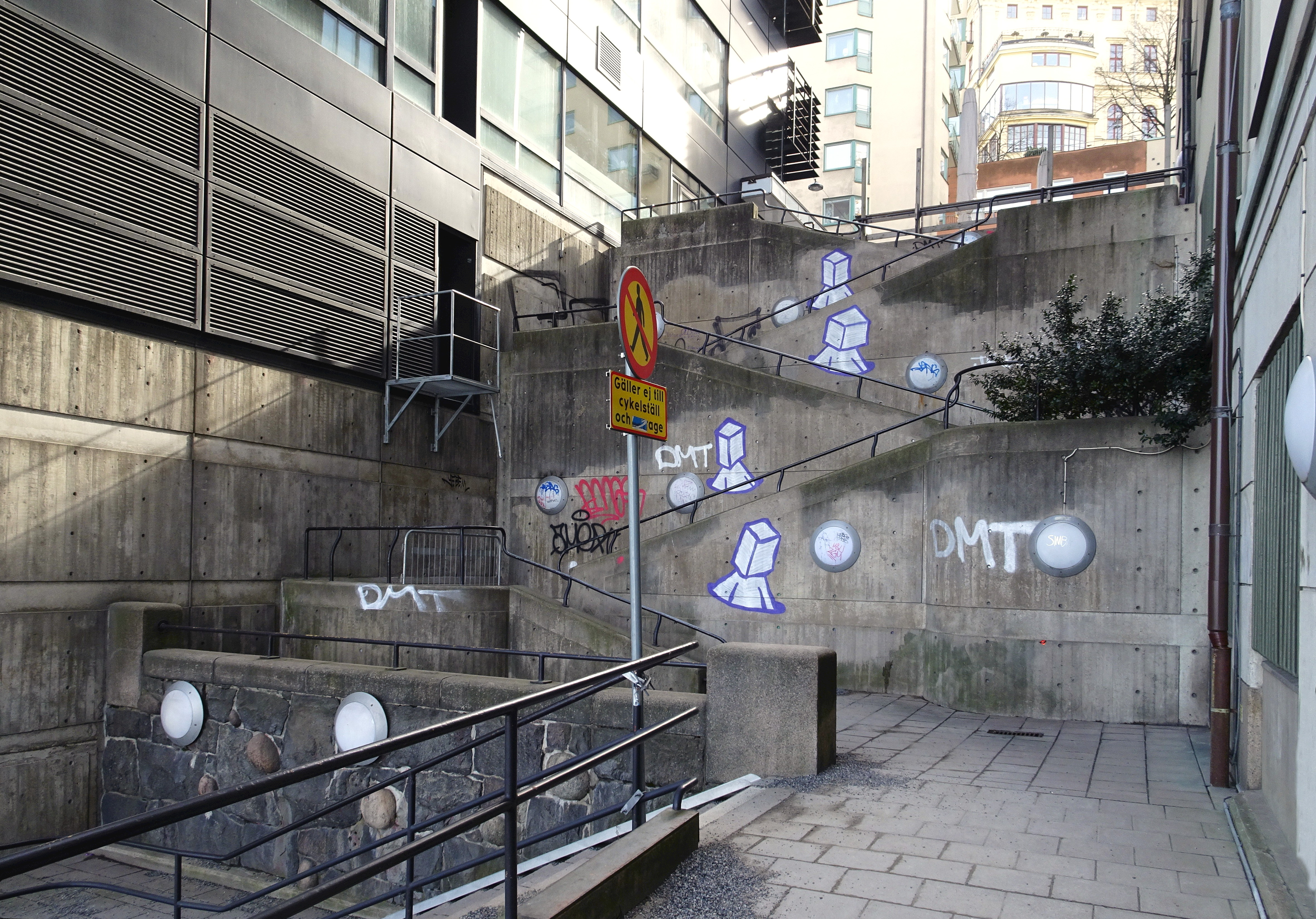 Borgmästartrappan